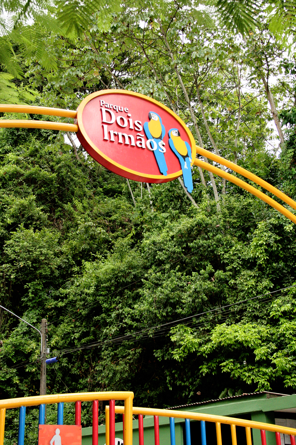 Entrada do Parque Dois Irmãos localizado no bairro de Dois Irmão em Recife, Pernambuco, Brasil.